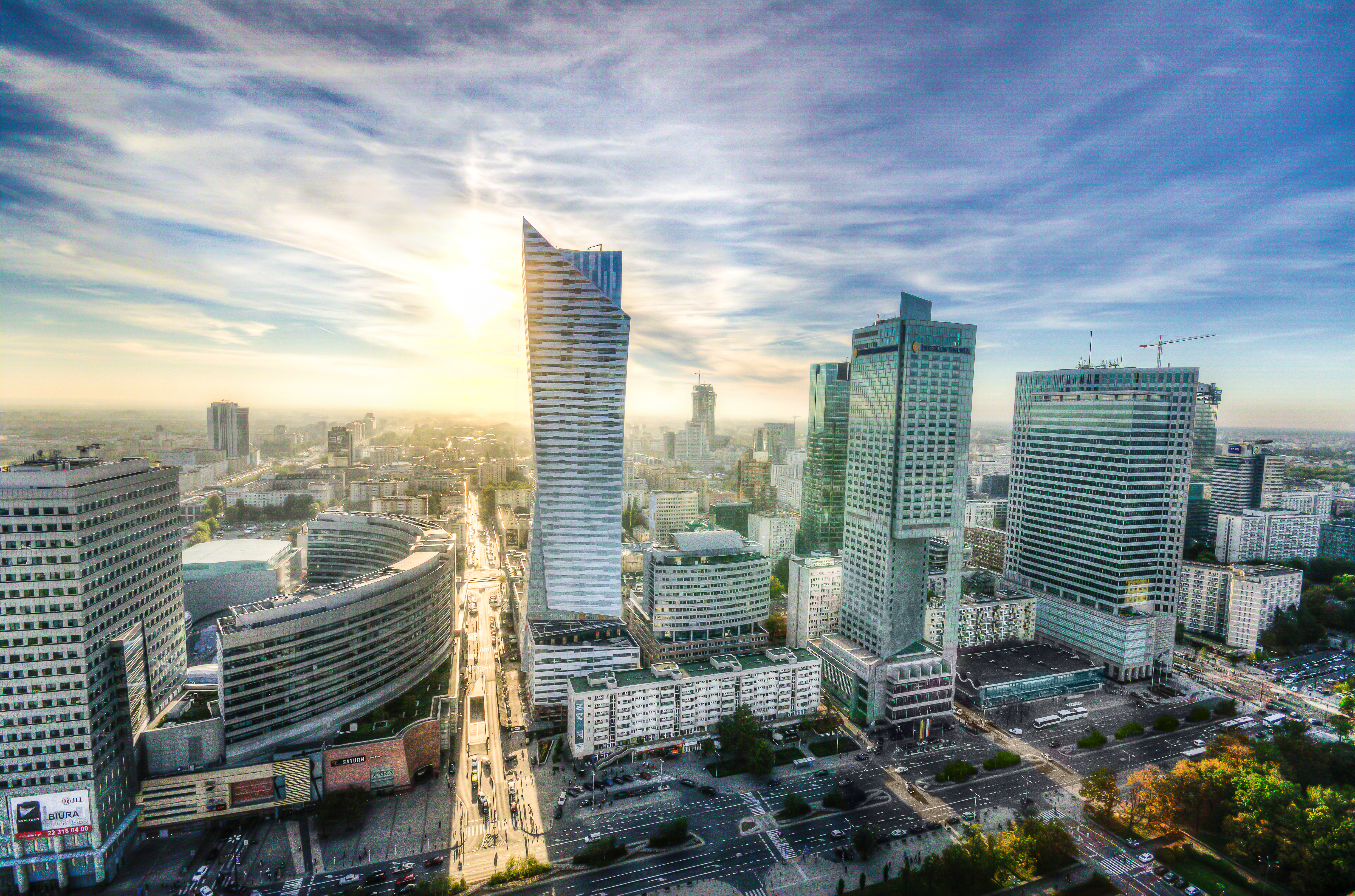 Centro de Varsóvia